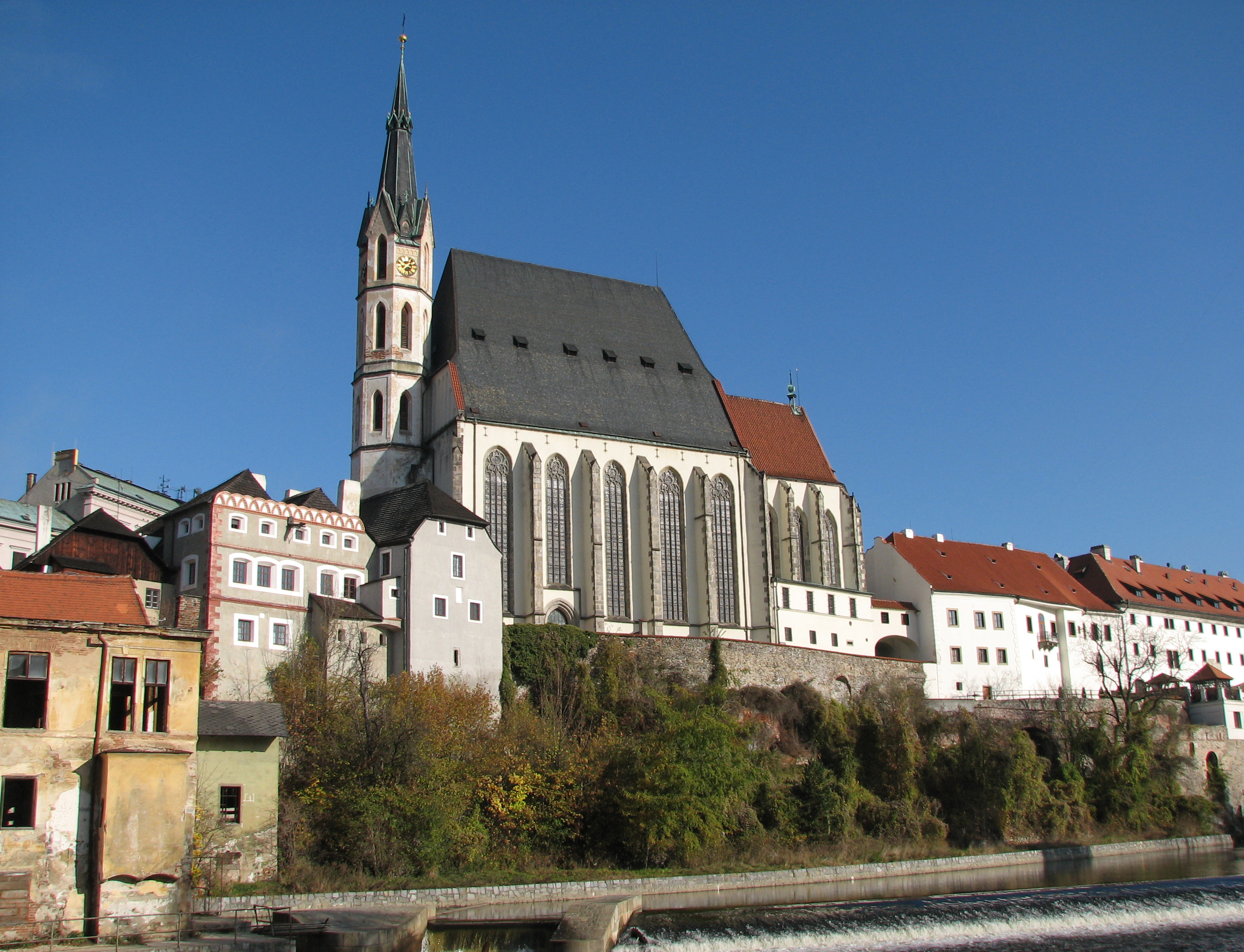 St. Vitus church in Český Krumlov